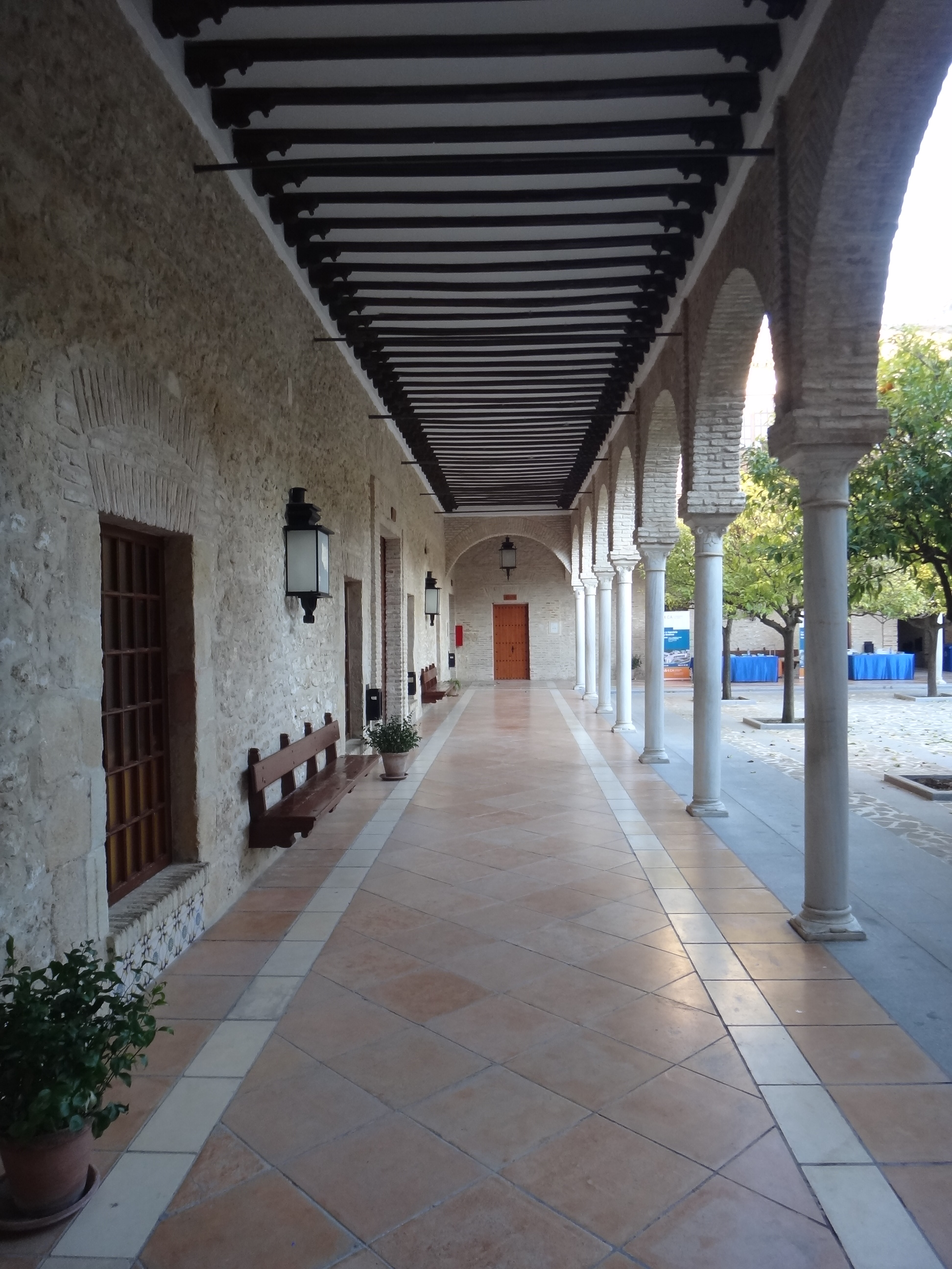 IES El Convento (Bornos)